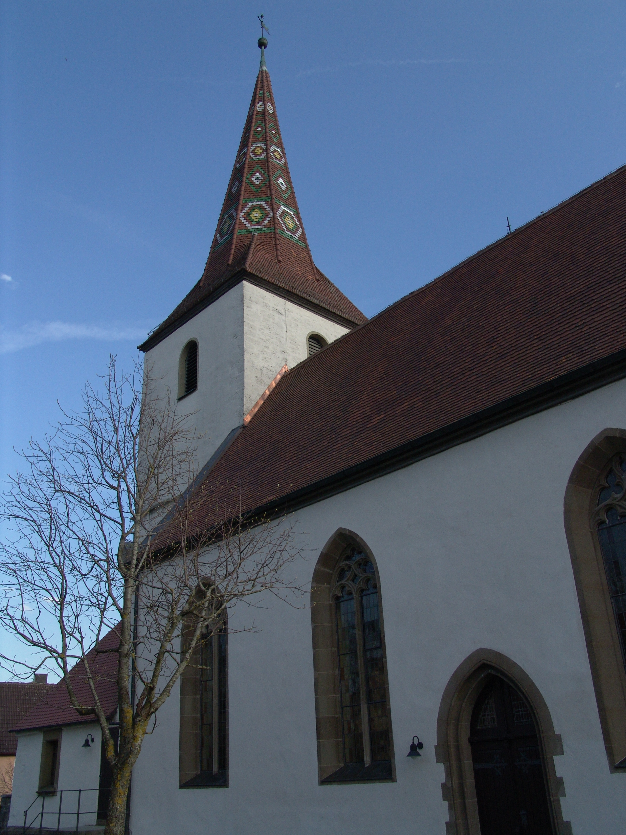 Evangelische Kirche